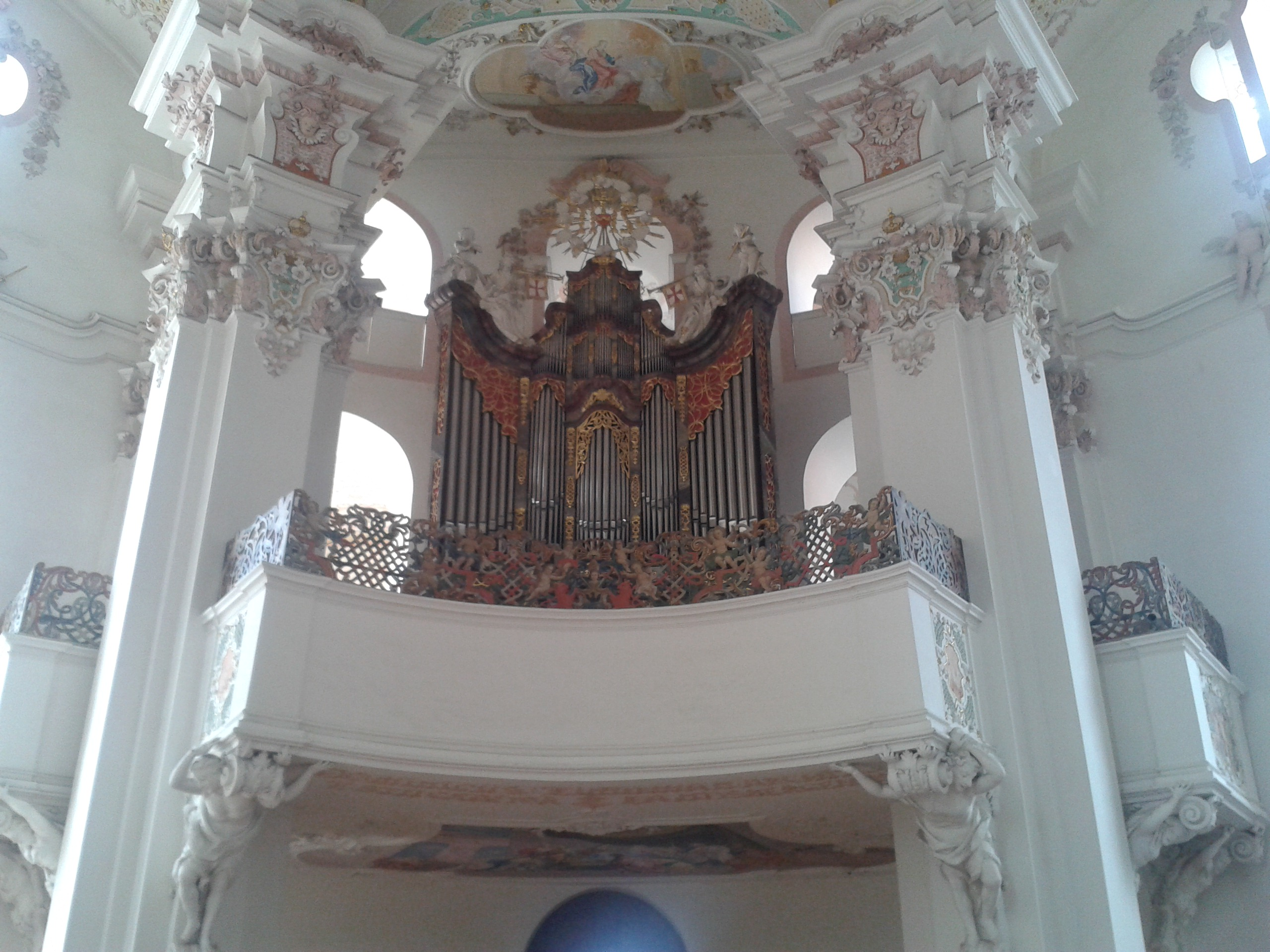 Wallfahrtskirche Steinhausen